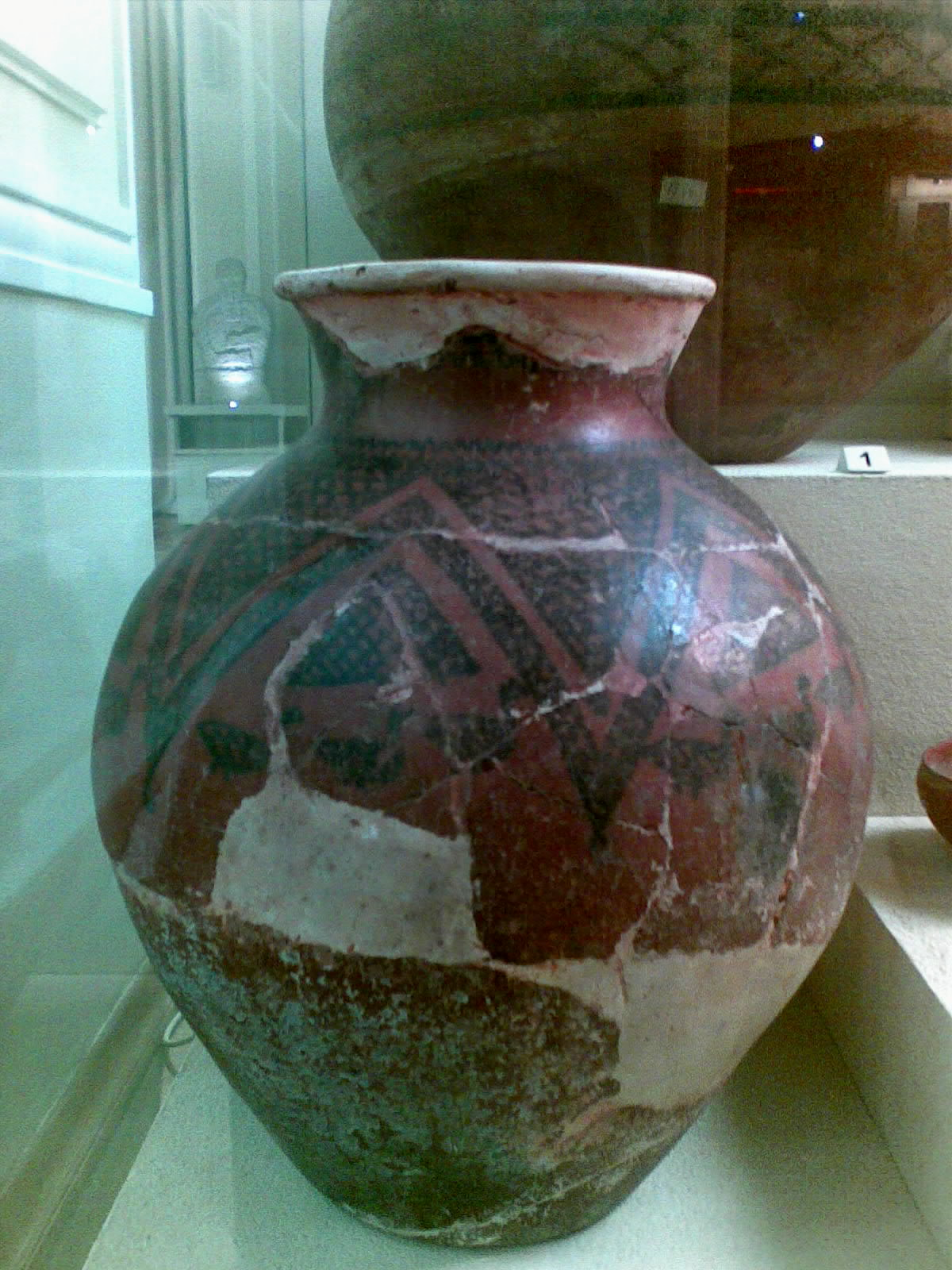 II Kültəpə boyalı qab